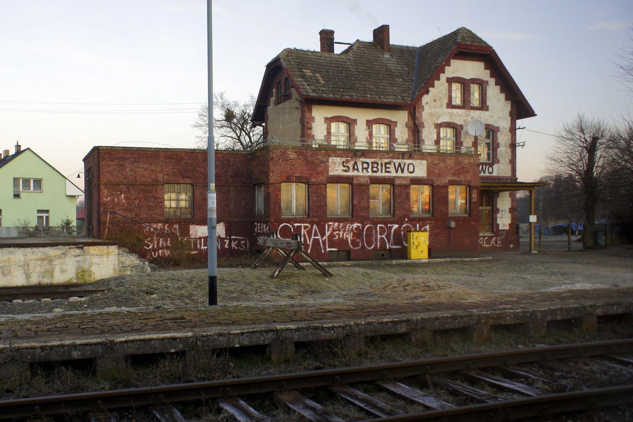 Stacja kolejowa w Sarbiewie